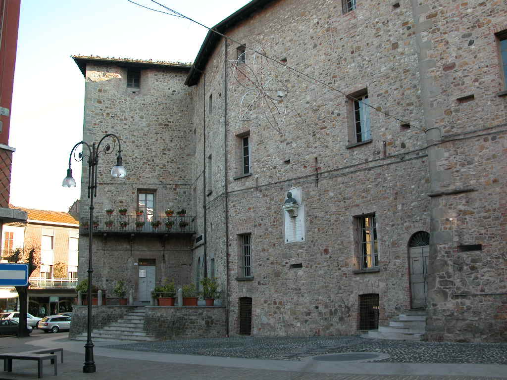 foto mia personale, sede comunale di Pianello val Tidone, 2007